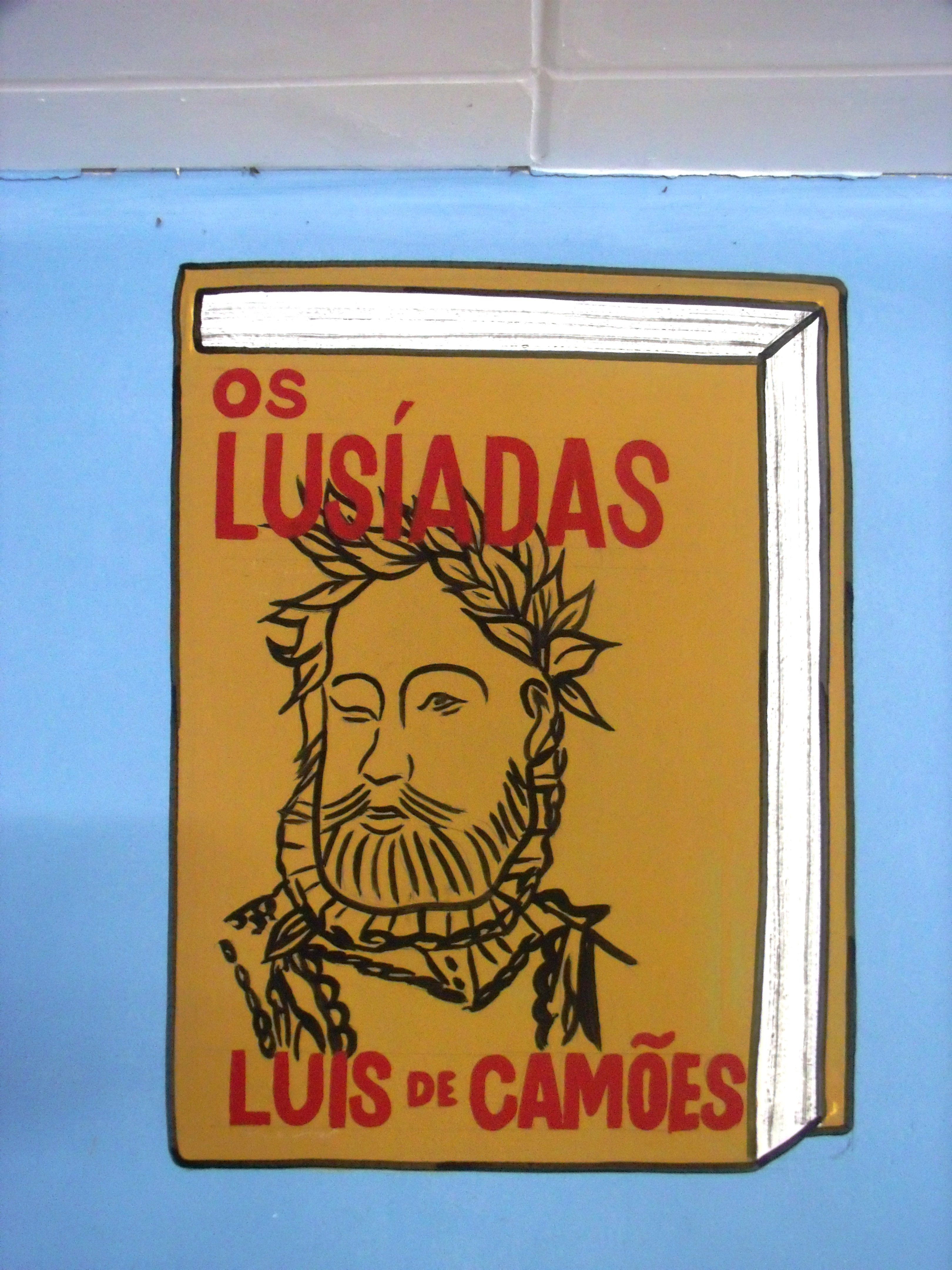 Desenho pictórico representando Os Lusíadas, de Luís Vaz de Camões, no interior da Biblioteca Pública de Campo Maior, no Piauí, Brasil.